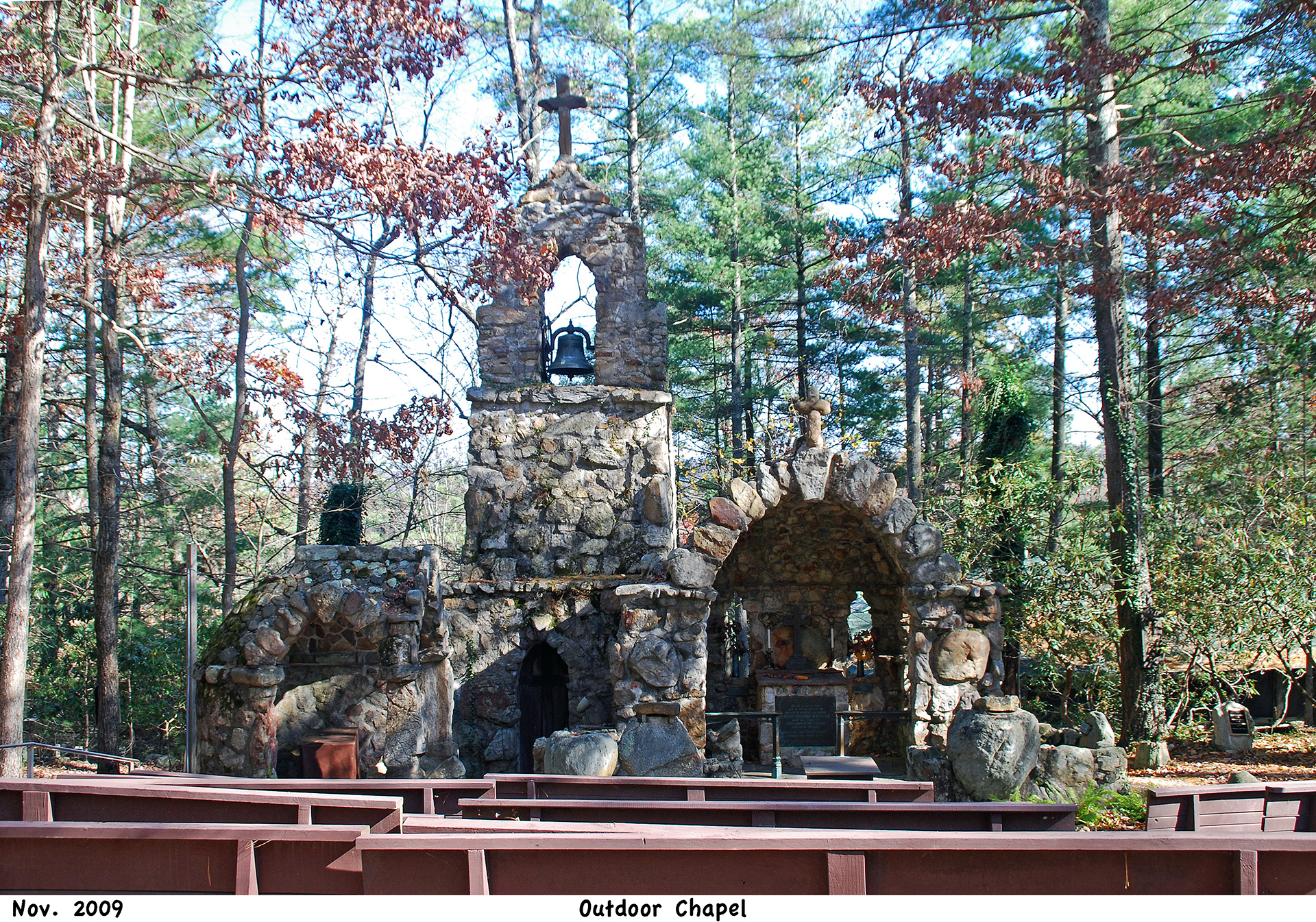 Outdoor Chapel